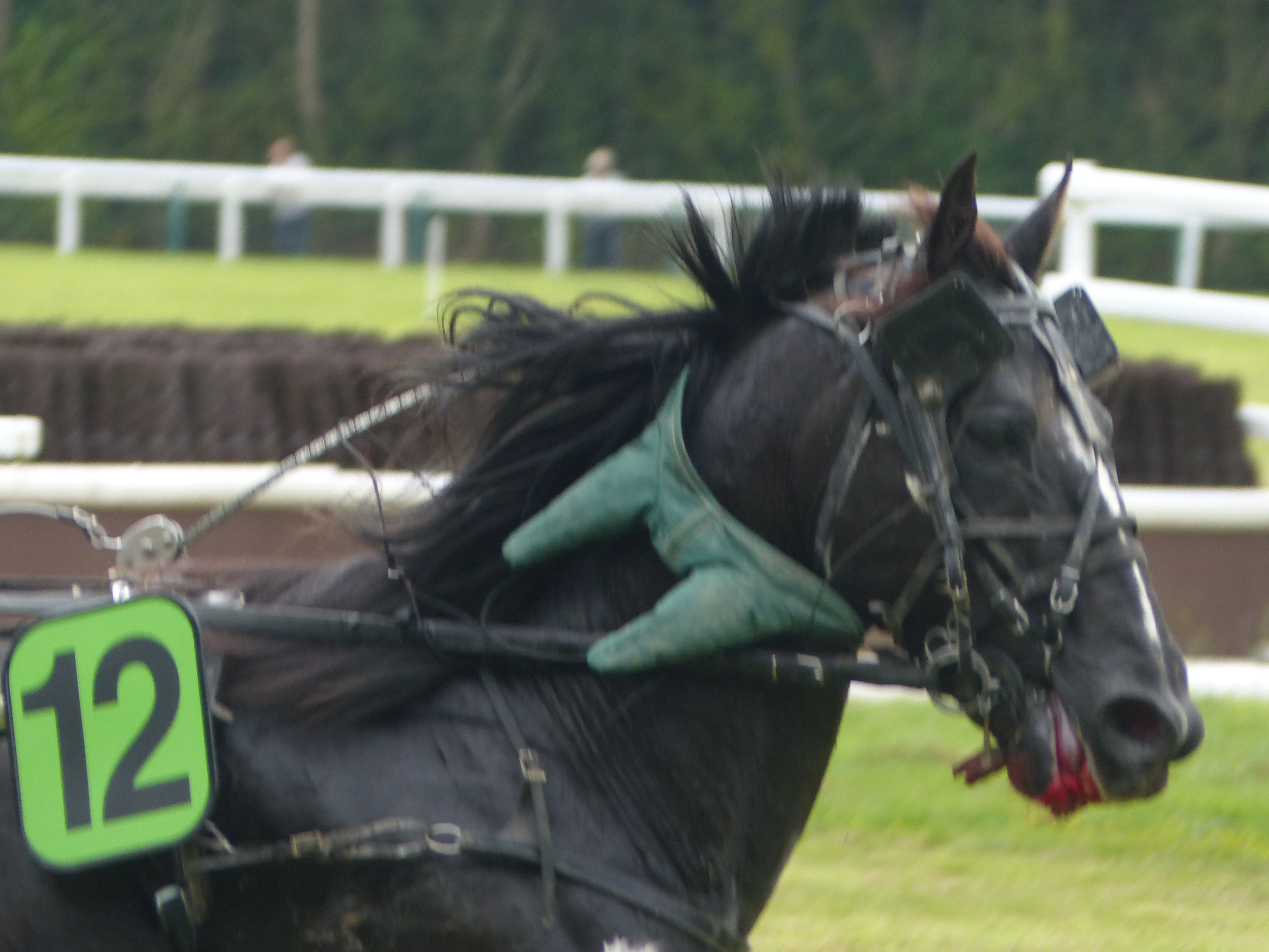 Hémorragie pulmonaire induite par l’exercice chez un cheval trotteur français noir, avec épistaxis bilatérale (saignement des naseaux et de la bouche)